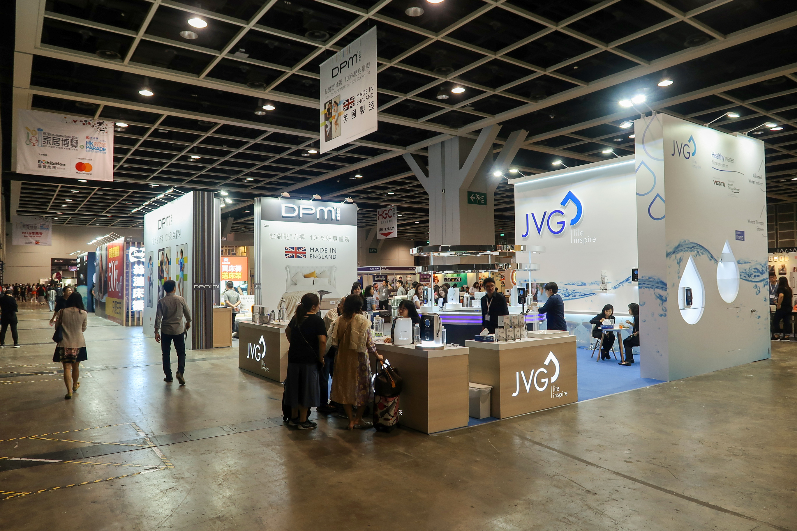 HK Home Expo 2018